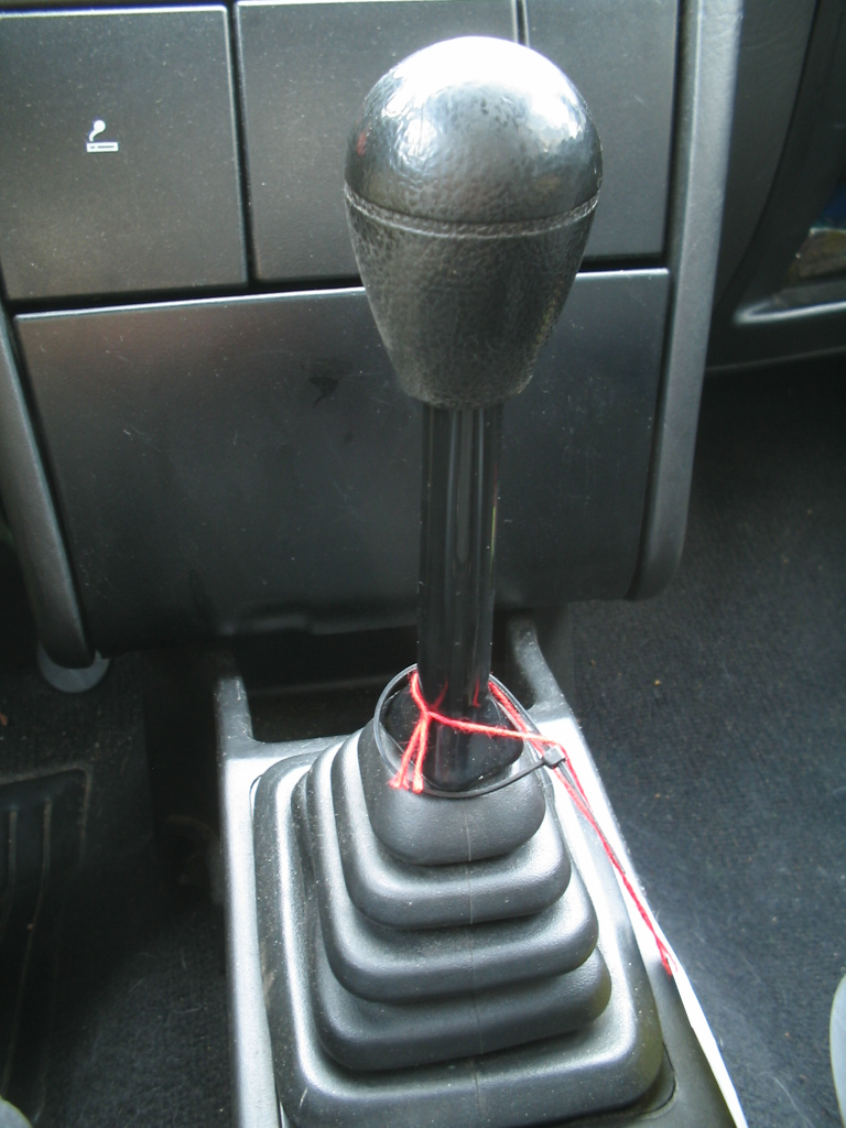 Versnellingspook Citroen BX